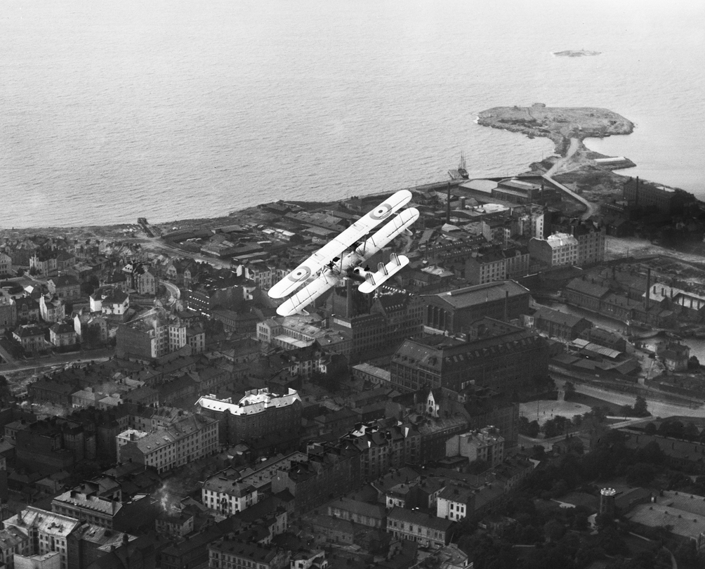 Royal Air Forcen Supermarine Southampton -lentovene Helsingin Punavuoren ja Eiran yllä 1930